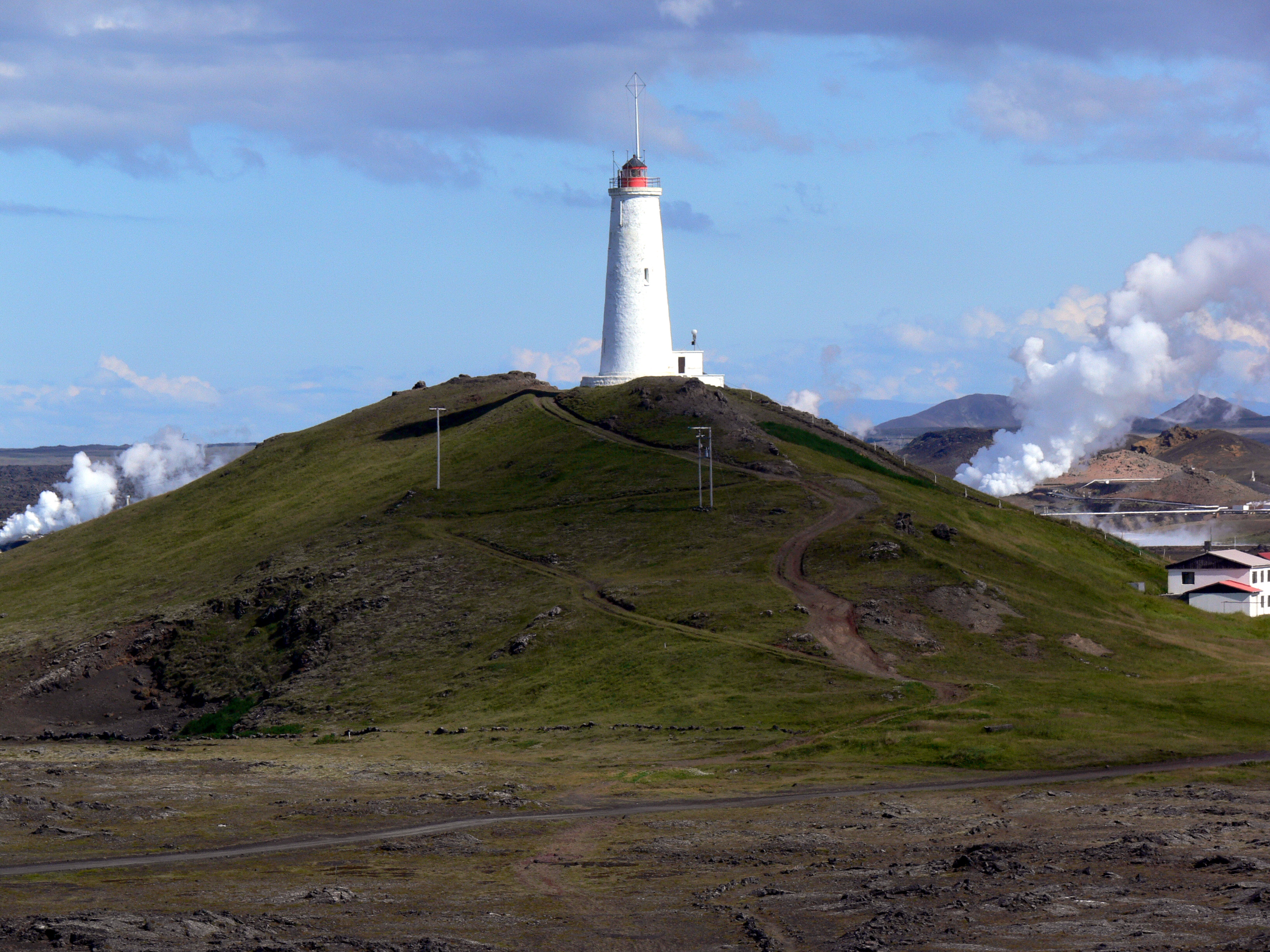 Leuchtturm Reykjanesvíti i Reykjanes